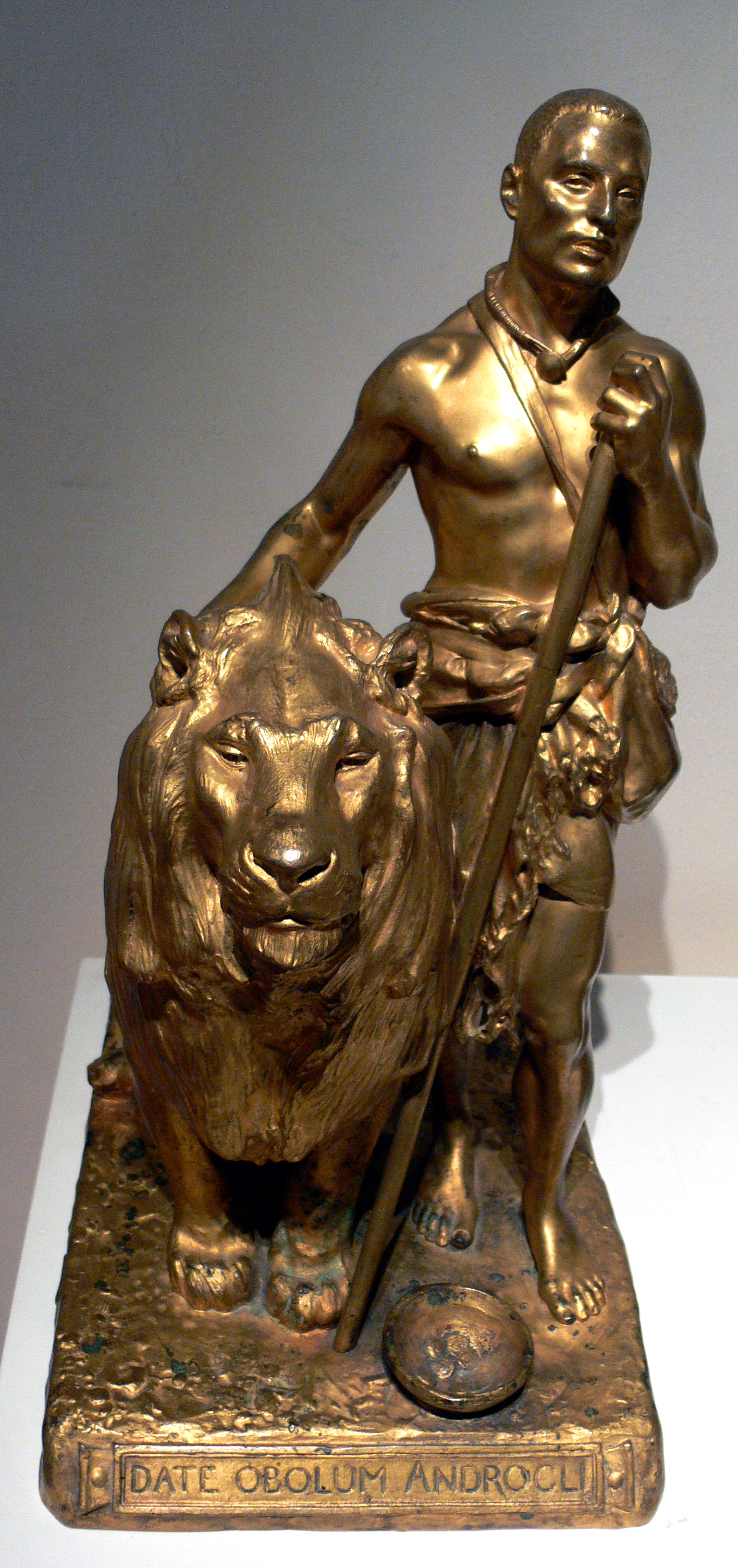 Jean-Léon Gérôme, Le Mendiant (Date obolum Androcii), vers 1898, bronze doré, Vesoul, musée Georges-Garret, 991.2.1, achat avec l'aide du Fram